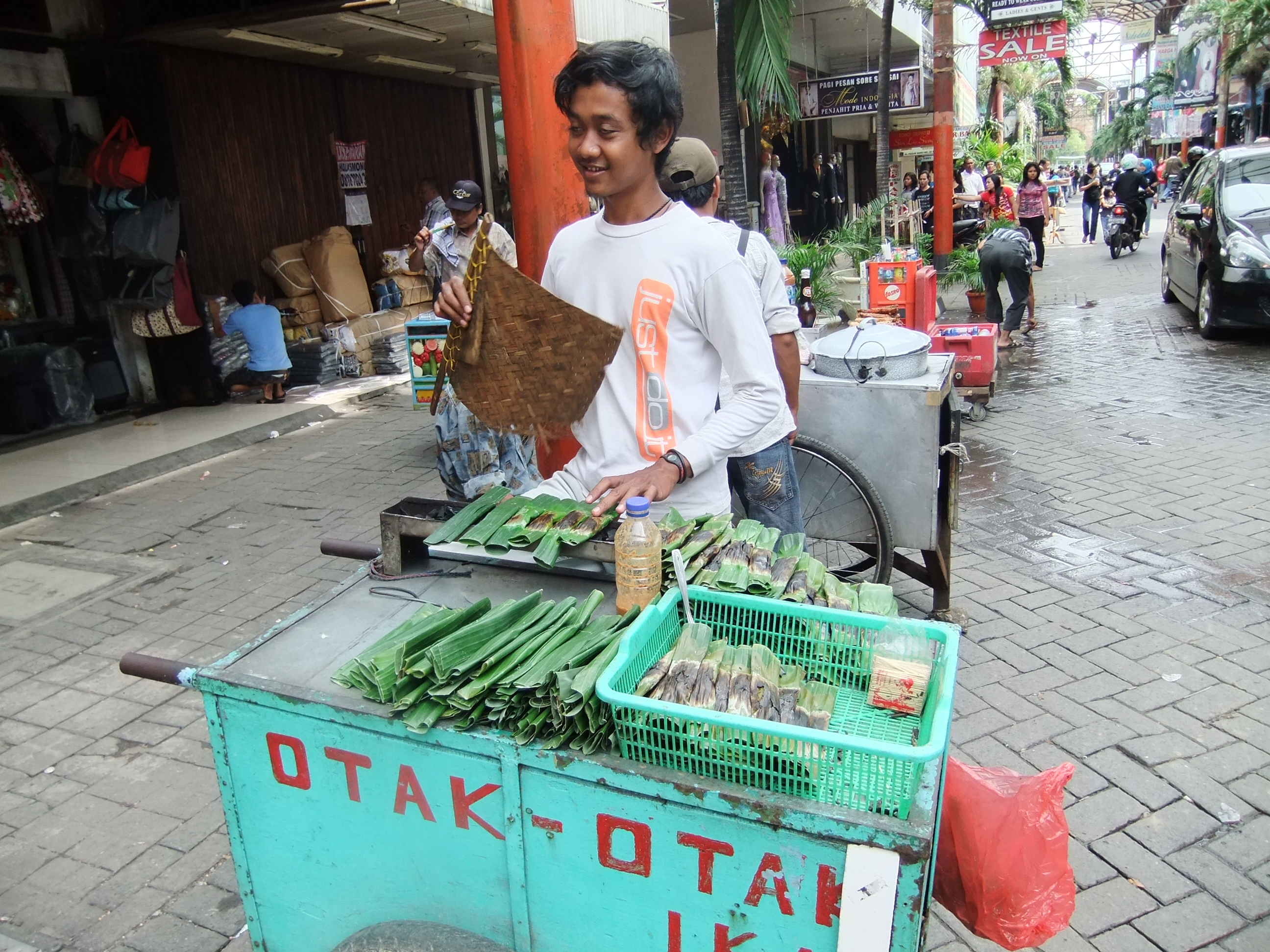 Penjual otak-otak di Pasar Baru, Jakarta